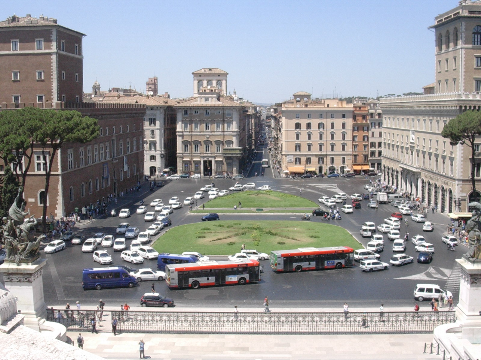 Piazza Venezia in Rome - view from the monument of Vittorio Emanuele II